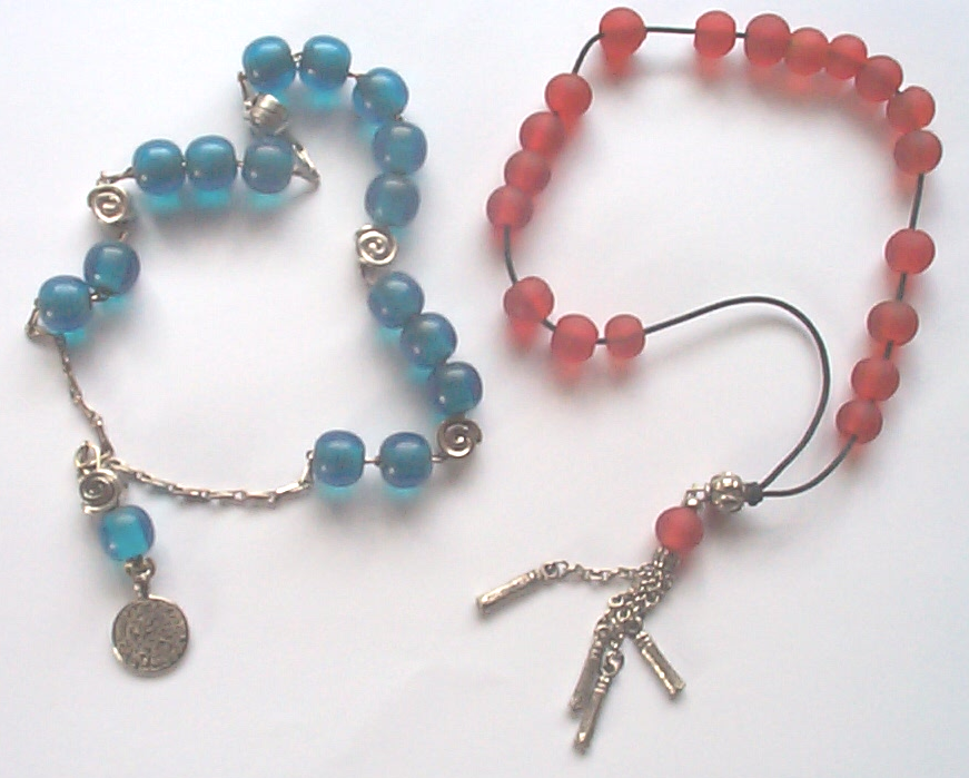 Zwei Kombologia.